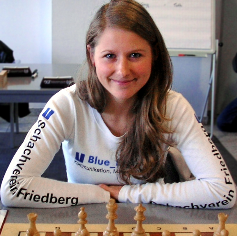 Melanie Ohme, Schachbundesliga der Frauen, November 2011 in Stuttgart